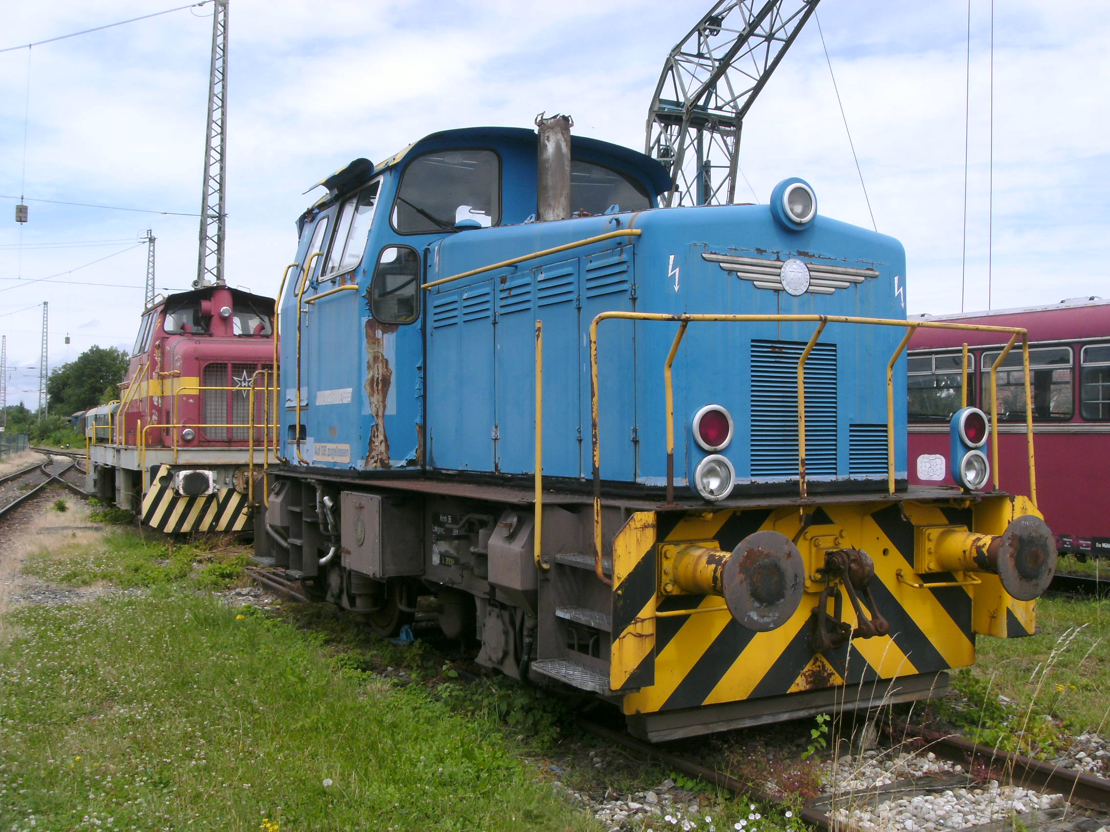 Diesellokomotive KM 1 (Baujahr 1965, Hersteller: Krauss-Maffei) im Bayerischen Eisenbahnmuseum in Nördlingen